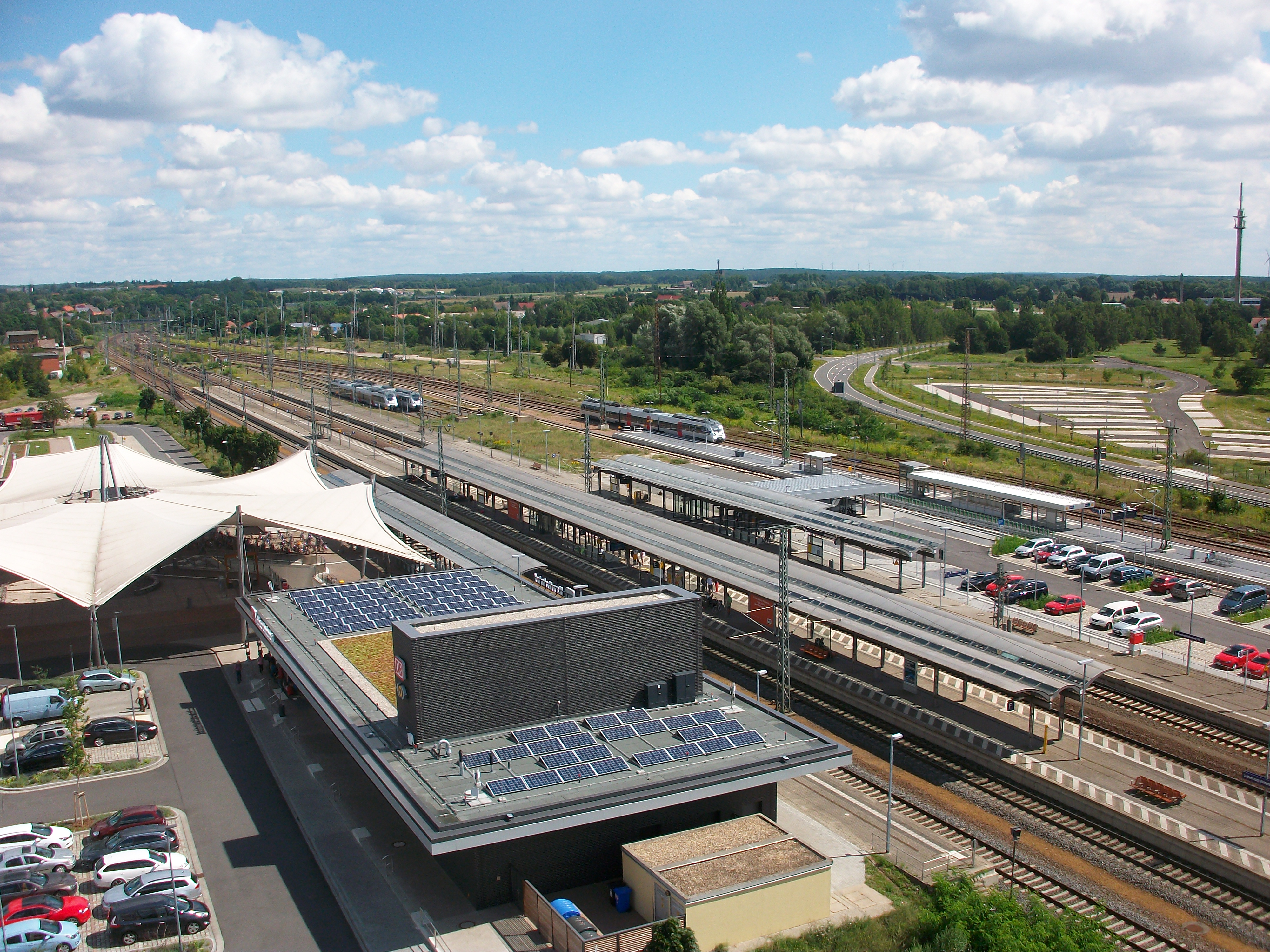 Hauptbahnhof Lutherstadt Wittenberg, Ausblick vom Bibelturm (2017)